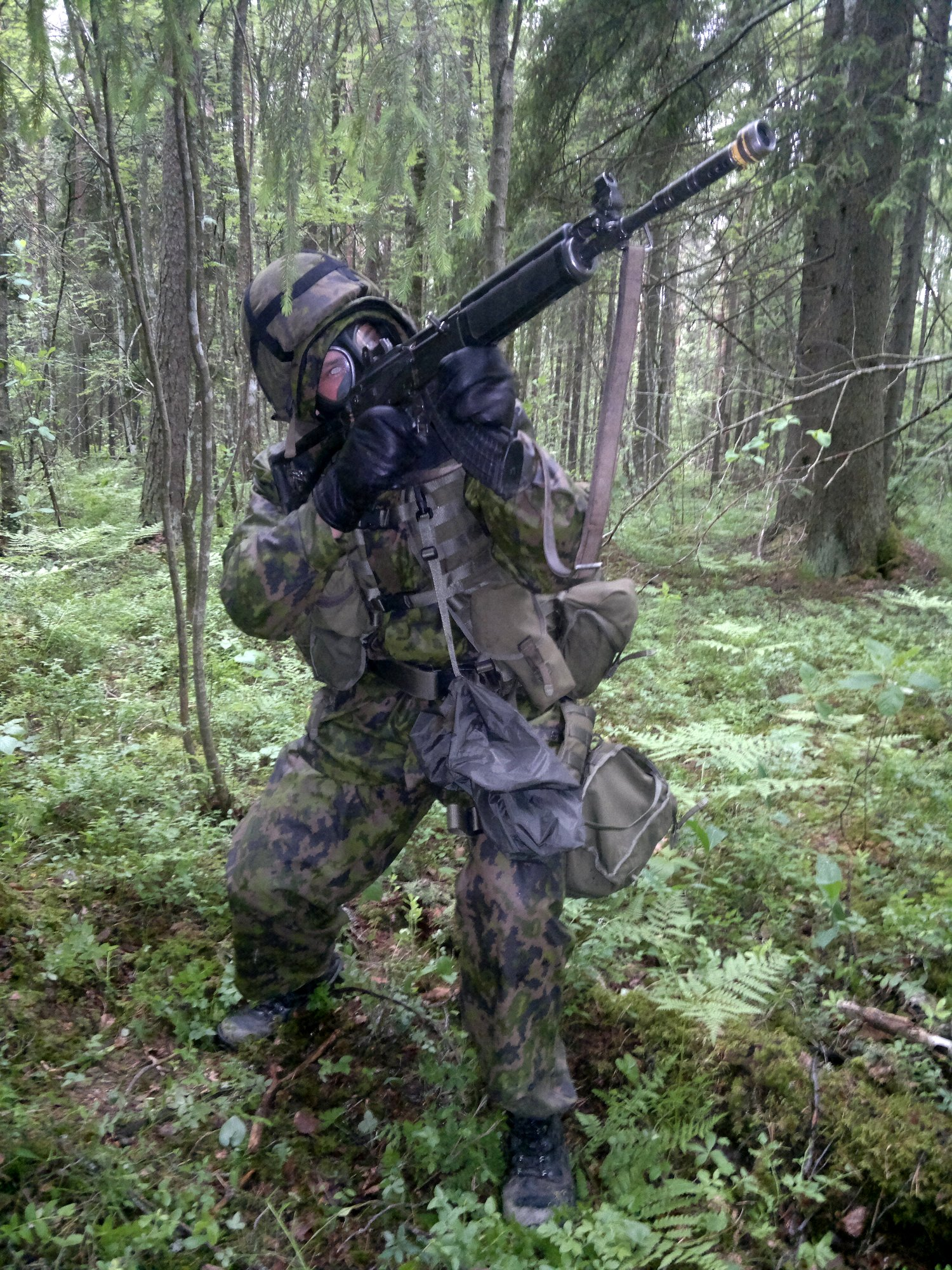 Sotilas Suomen armejan taistelu- ja suojausvarustuksessa.